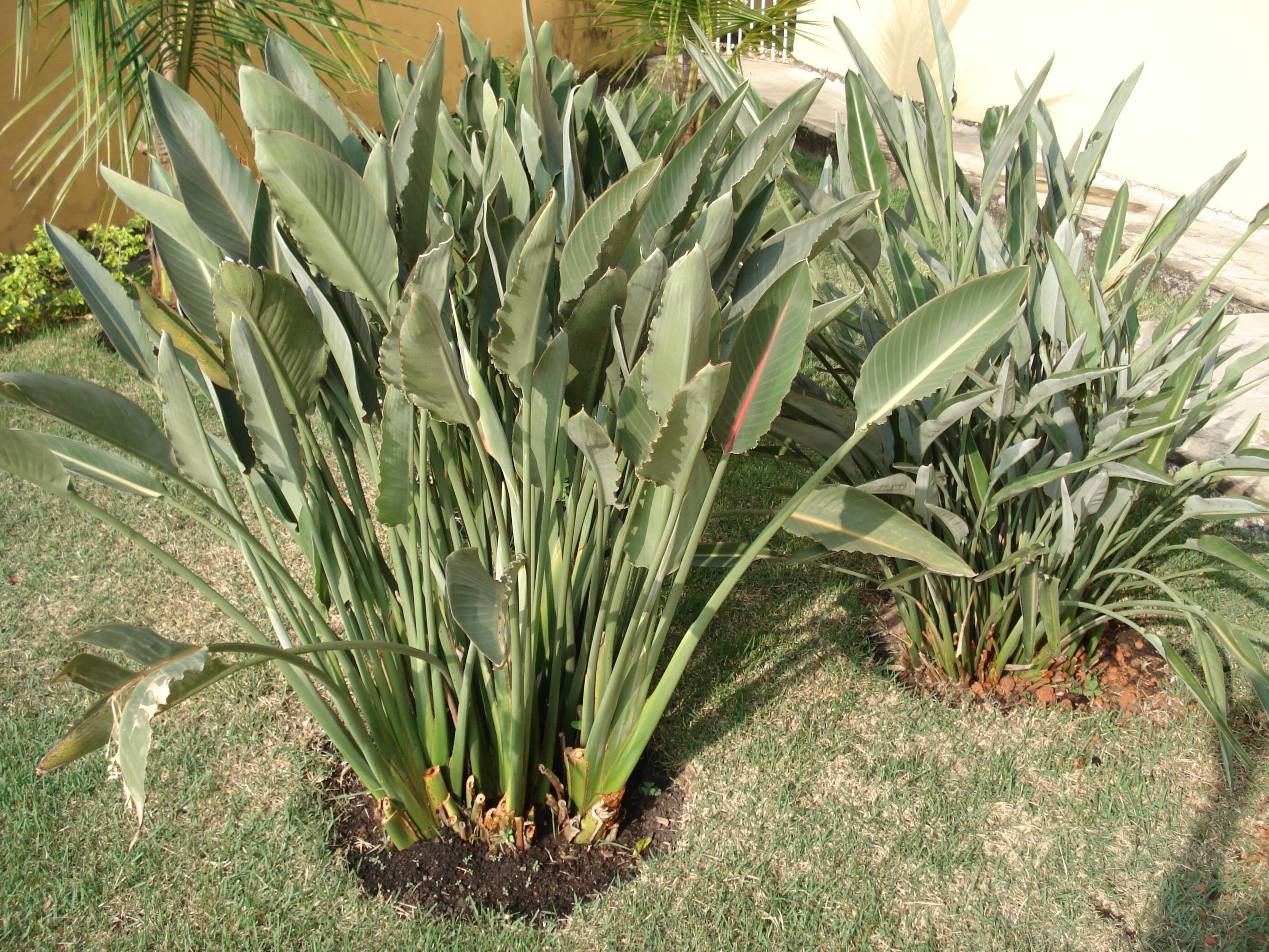 Strelitzia reginae, in São José dos Campos, Brasil.